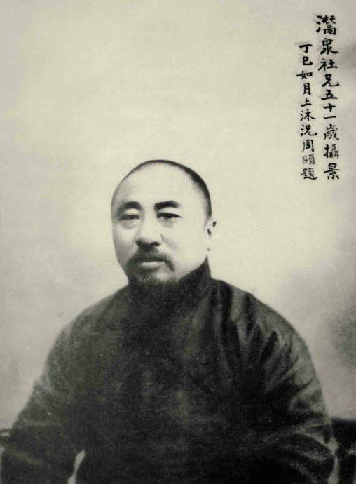 中国篆刻家吴隐（1867－1922），1917年农历二月摄